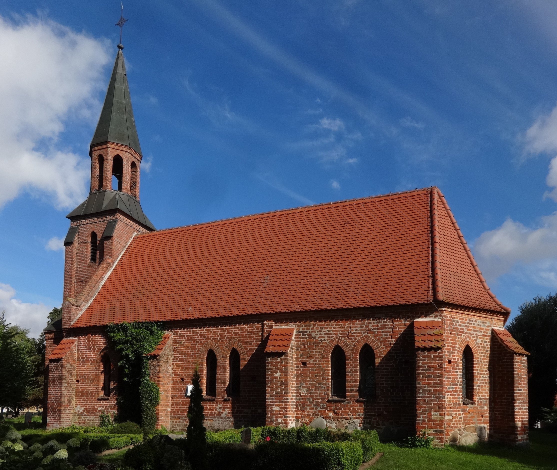 Die Backsteinkirche in Kirchdorf entstand im 14. Jahrhundert und wurde im 17. Jahrhundert um ein Kirchenschiff erweitert. Im 19. Jahrhundert erfolgte ein neugotischer Umbau.